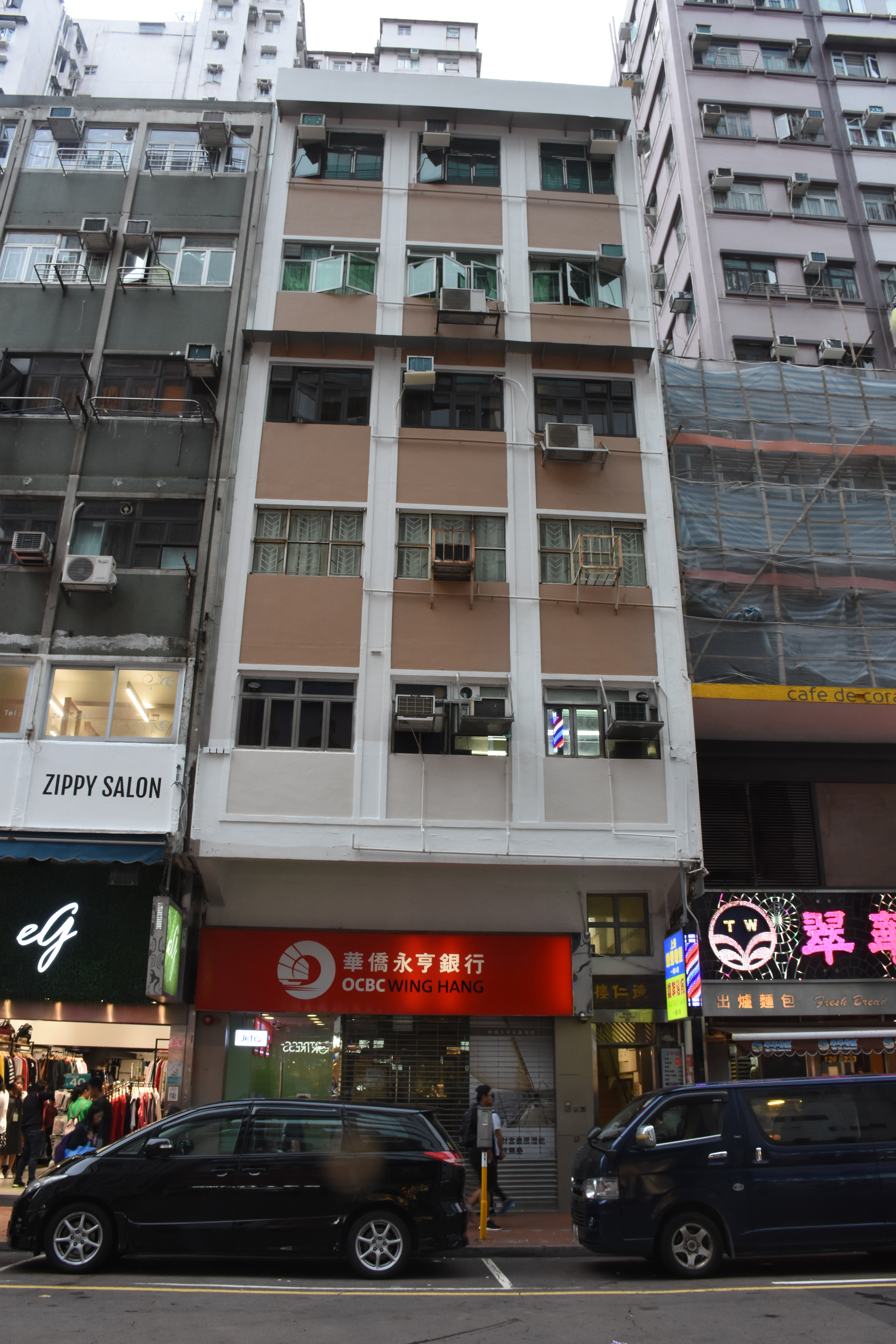 中文（香港）: 德仁樓第十期。